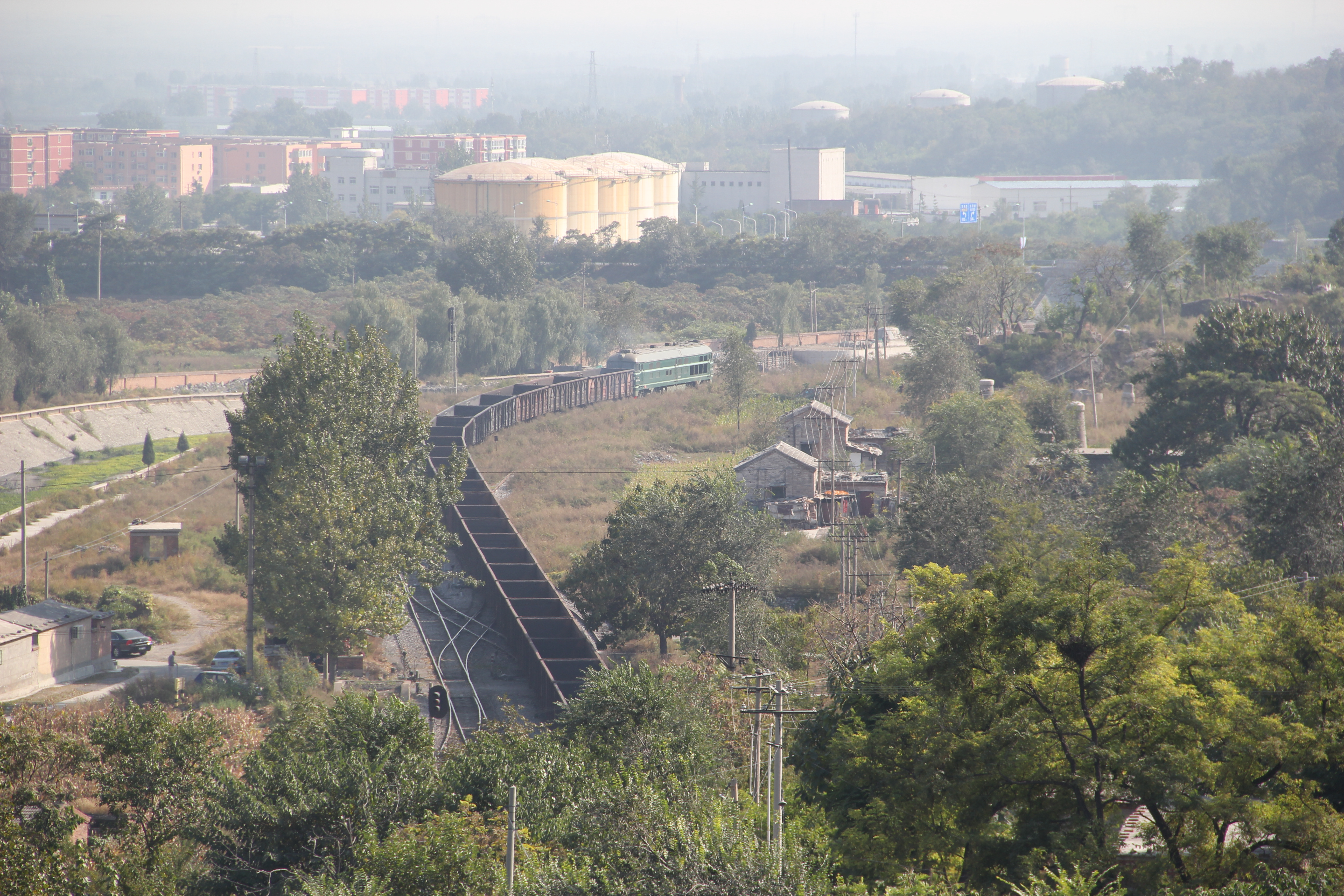 周口店线上工作的DF4B